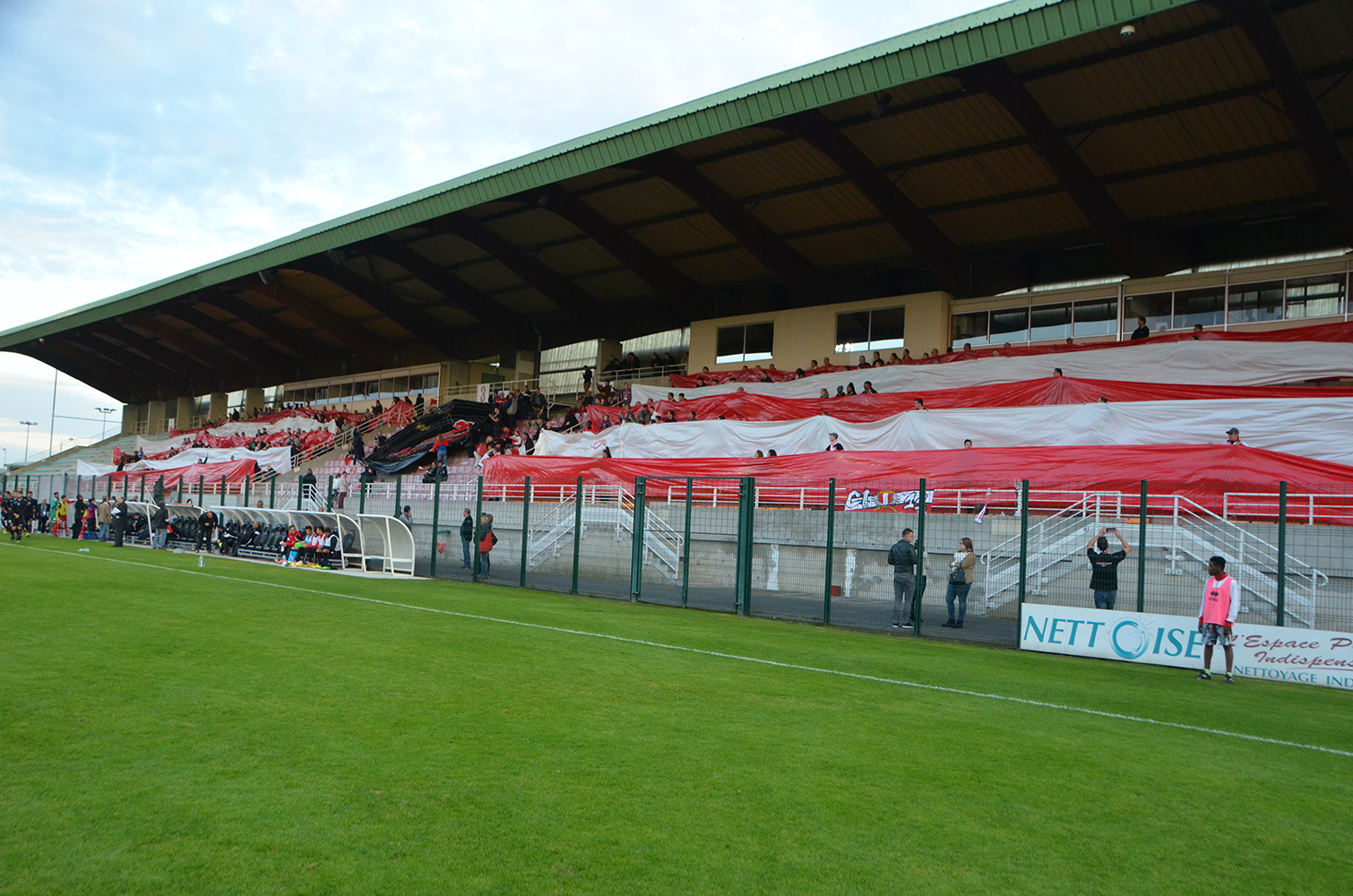 Le Stade Pierre Brisson à l'occasion des 70 ans de l'AS Beauvais Oise.